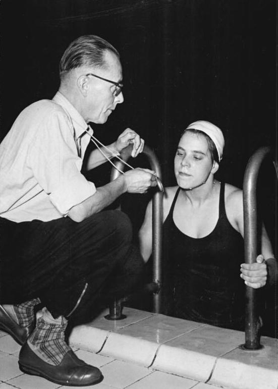 Eva-Maria ten Elsen beim Training Zentralbild Schlegel 16.10.1956 Die deutsche Olympiateilnehmerin Eva-Maria ten Elsen (Schwimmen) Eva-Maria ten Elsen (Rotation Leipzig) mit ihrem Trainer Max Reihe.